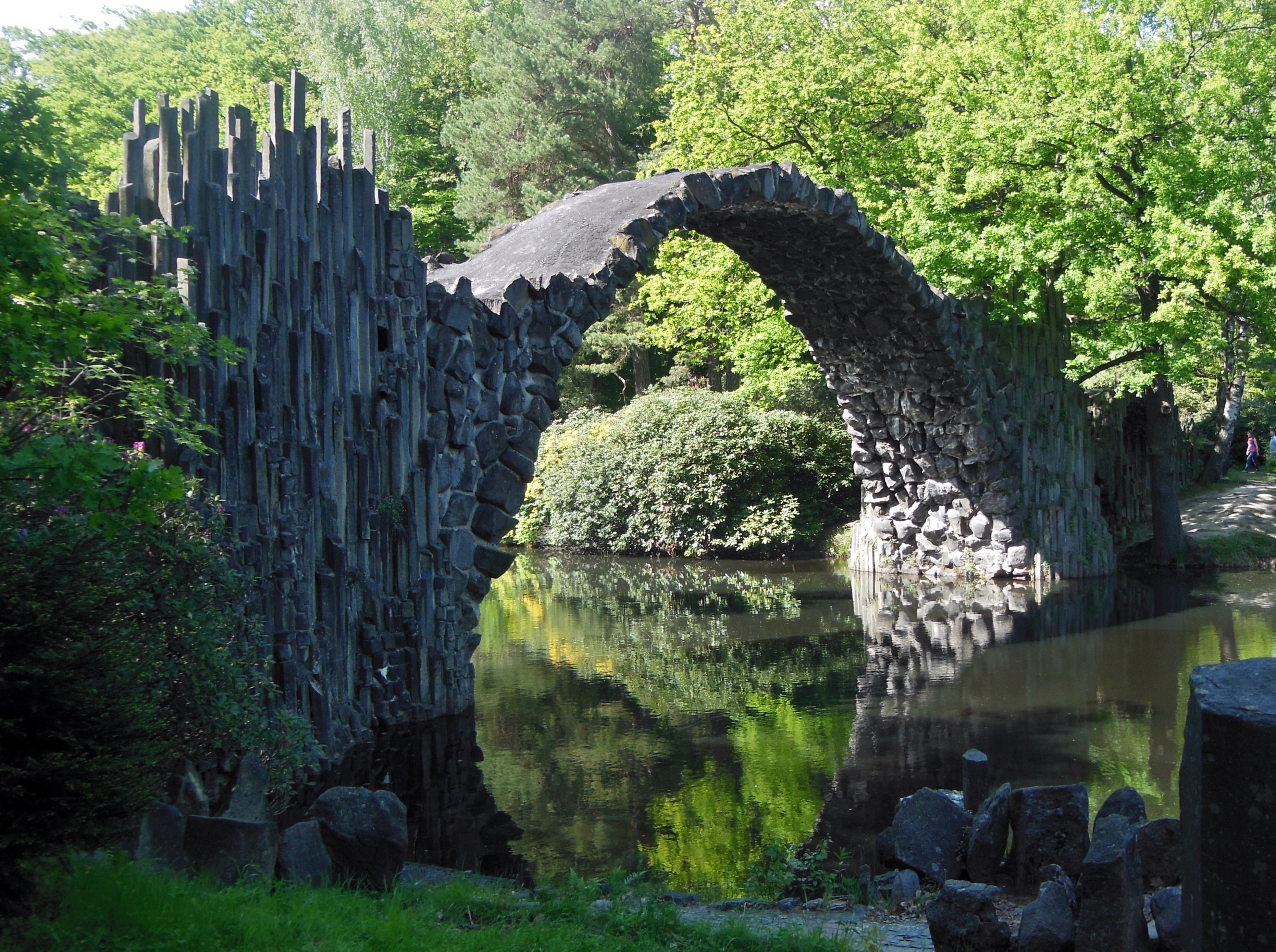 Rakotzbrücke im Azaleen- und Rhododendronpark Kromlau